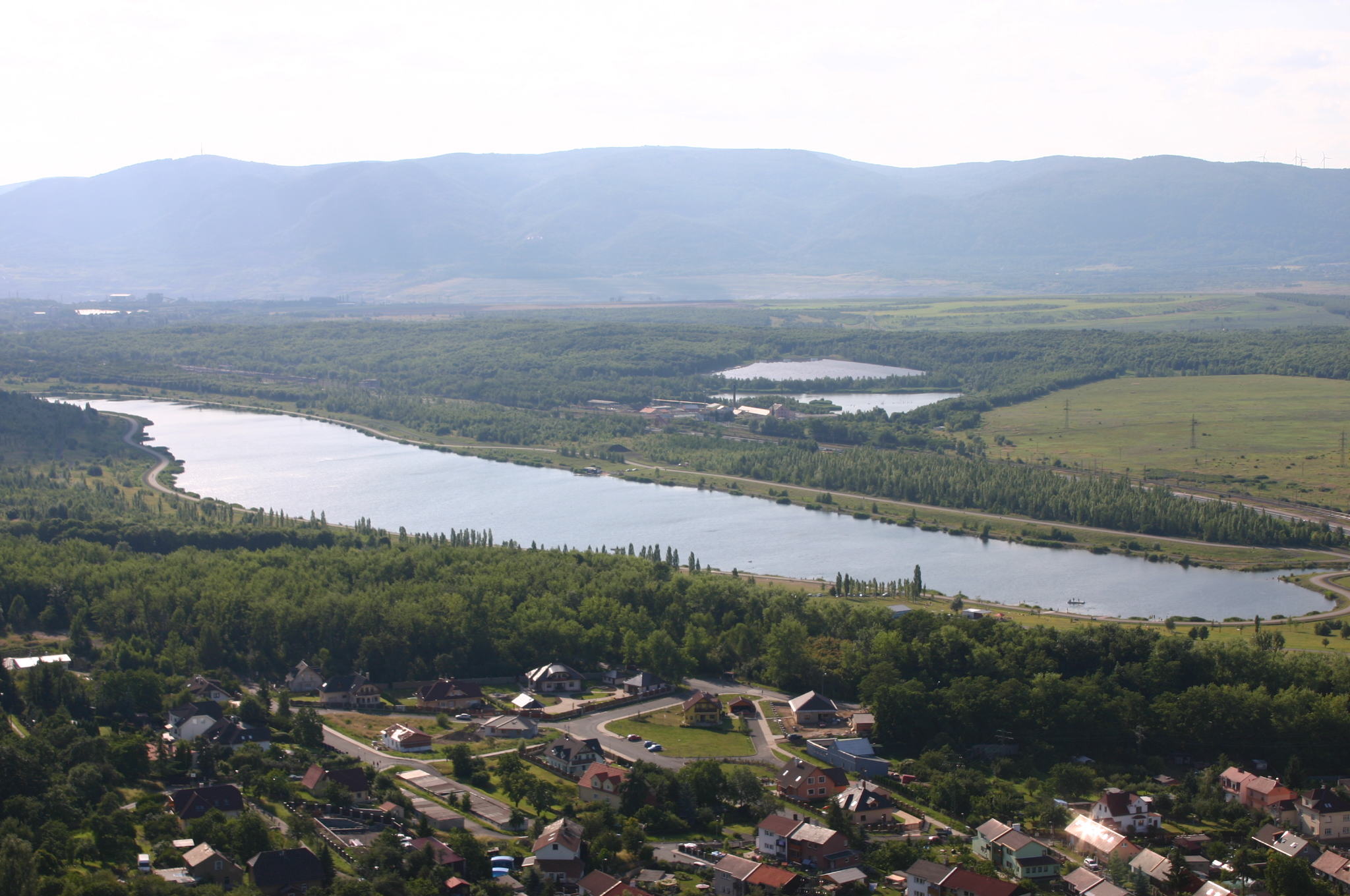 Vodní nádrž Matylda.